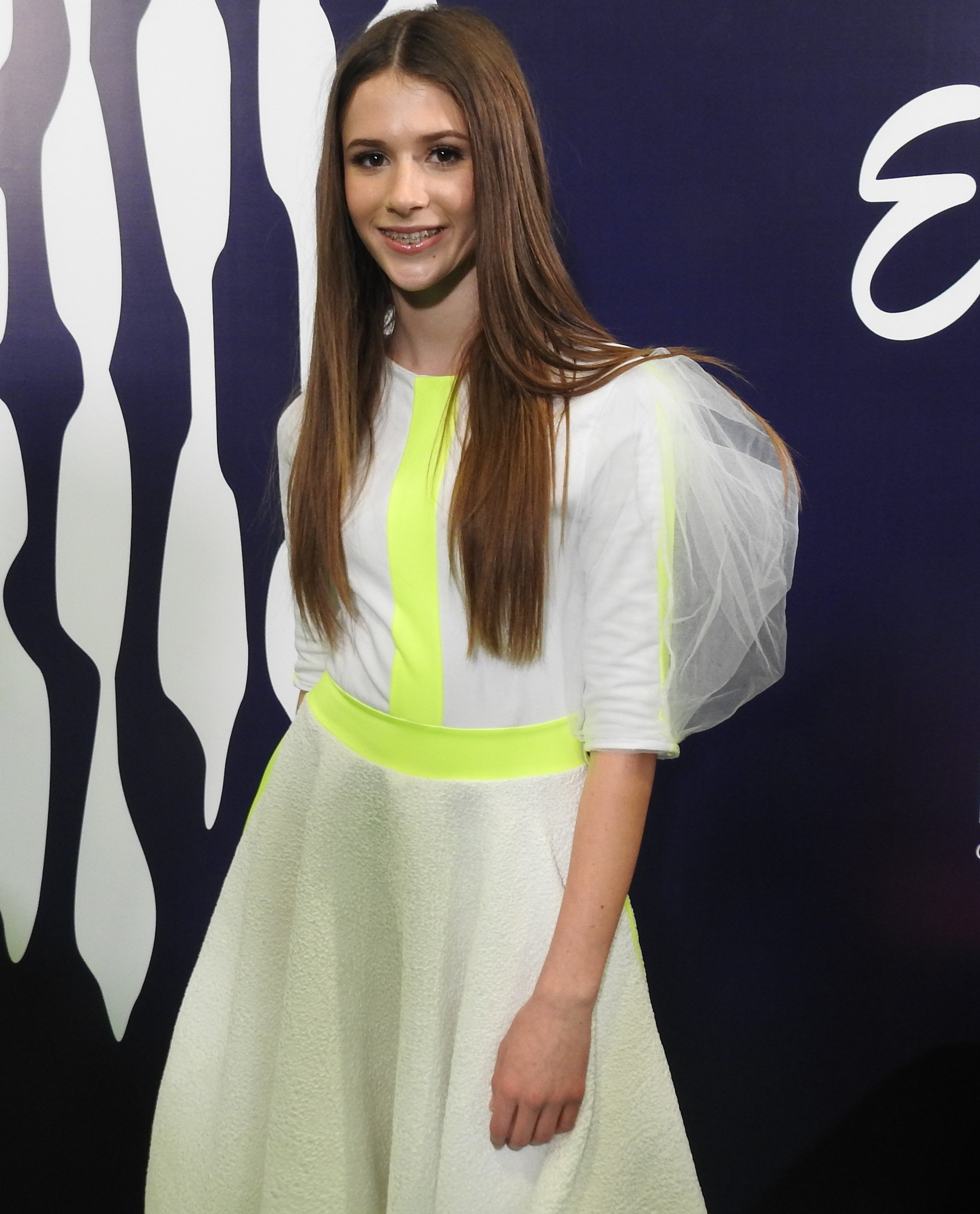 Polska piosenkarka Roksana Węgiel podczas 16. Konkursu Piosenki Eurowizji dla Dzieci w Mińsku, 23 listopada 2018.